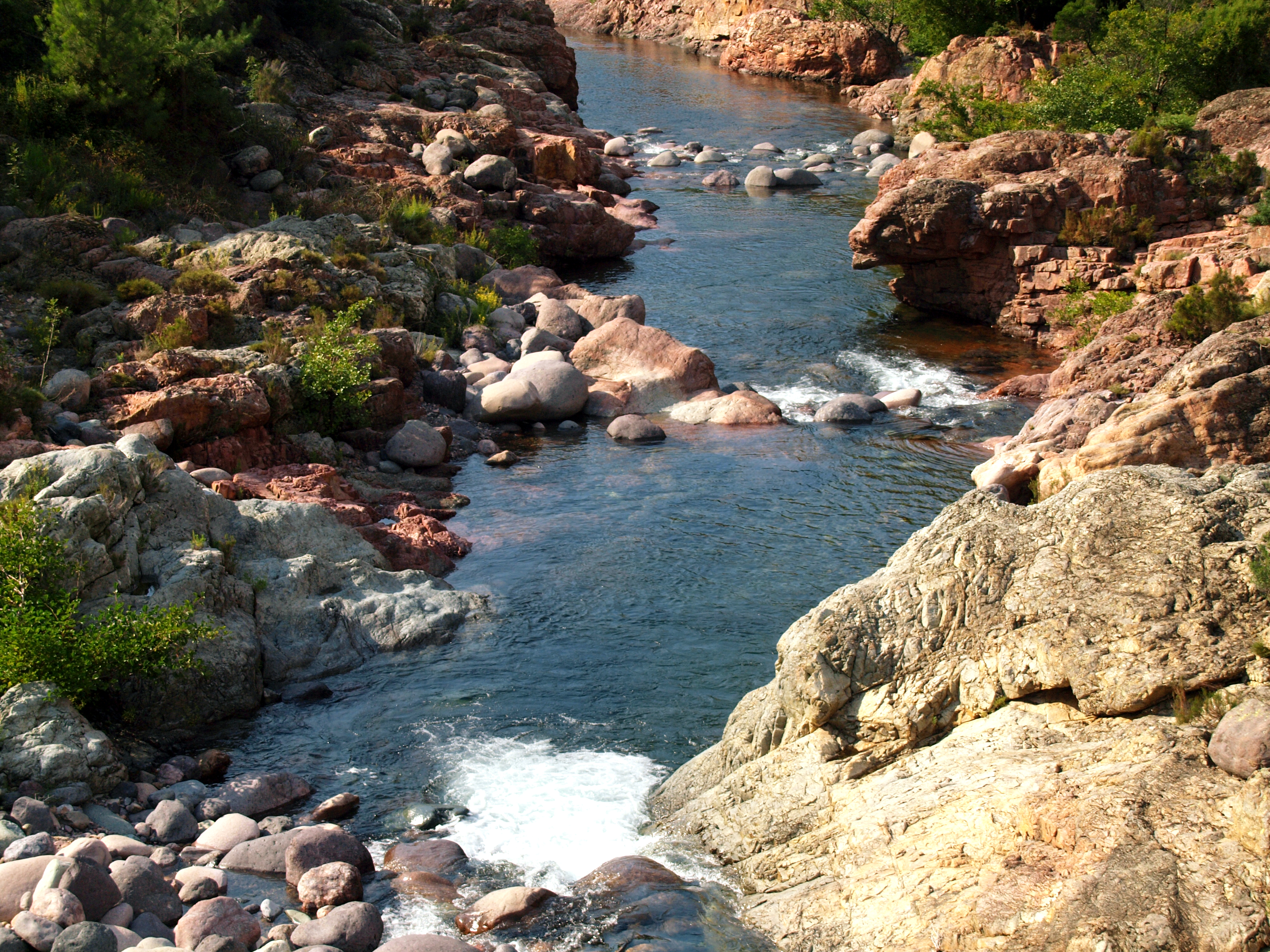 Manso - Le Fango en aval du pont de Manso